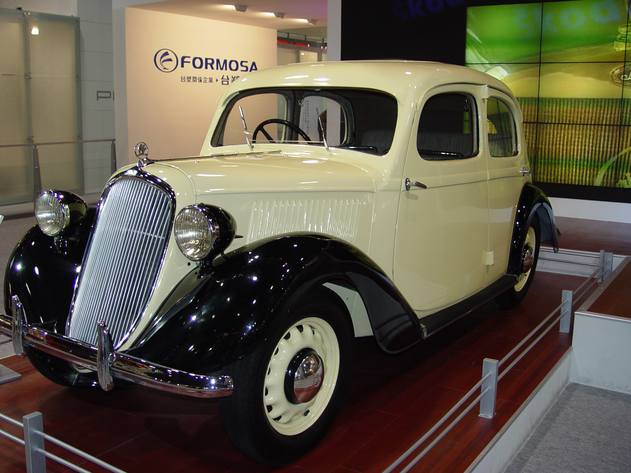 Old Škoda Rapid (1935) - probably Škoda Rapid type 901 (see [1]Skoda_3